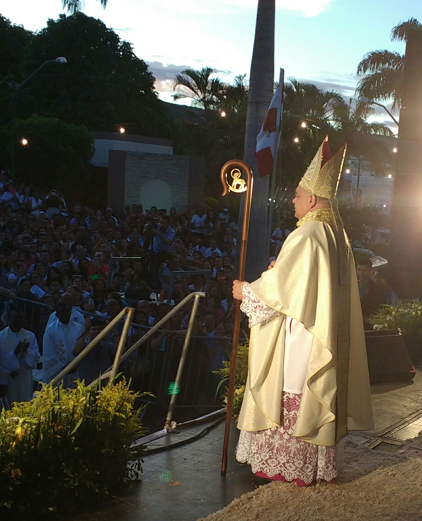 Momento da posse do nono bispo diocesano de Caetité, Bahia, Brasil, Dom Carvalho.